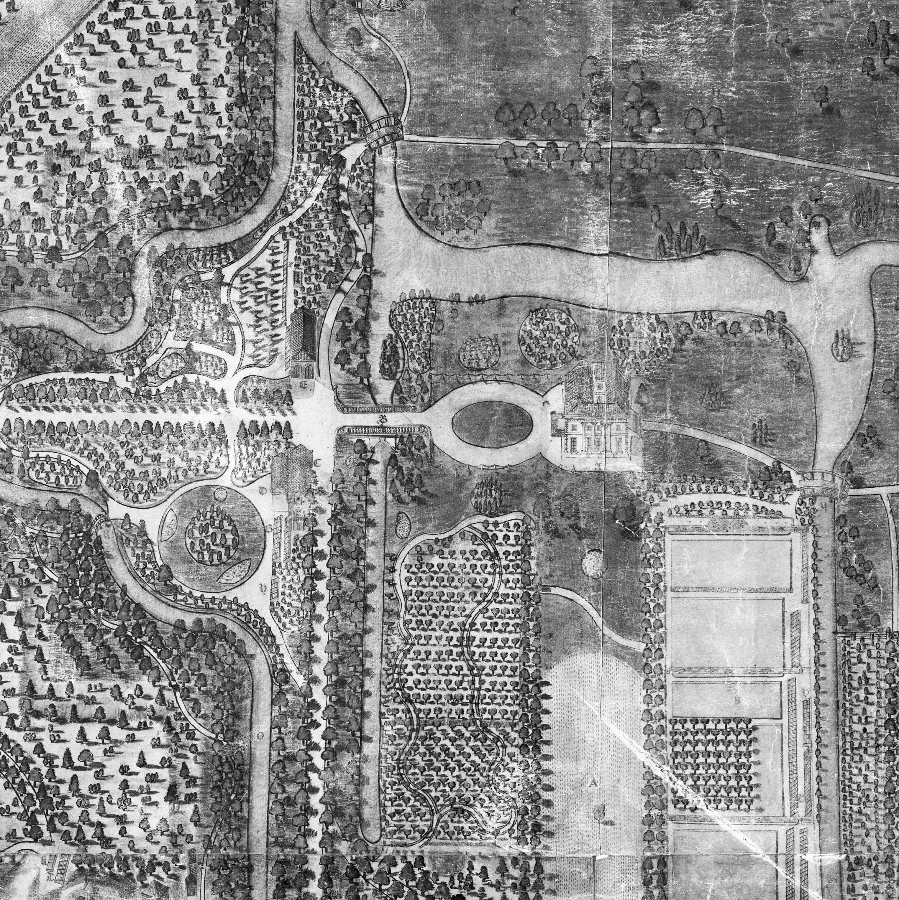 Huis Elswout: details van kaart van H.v.Zutphen